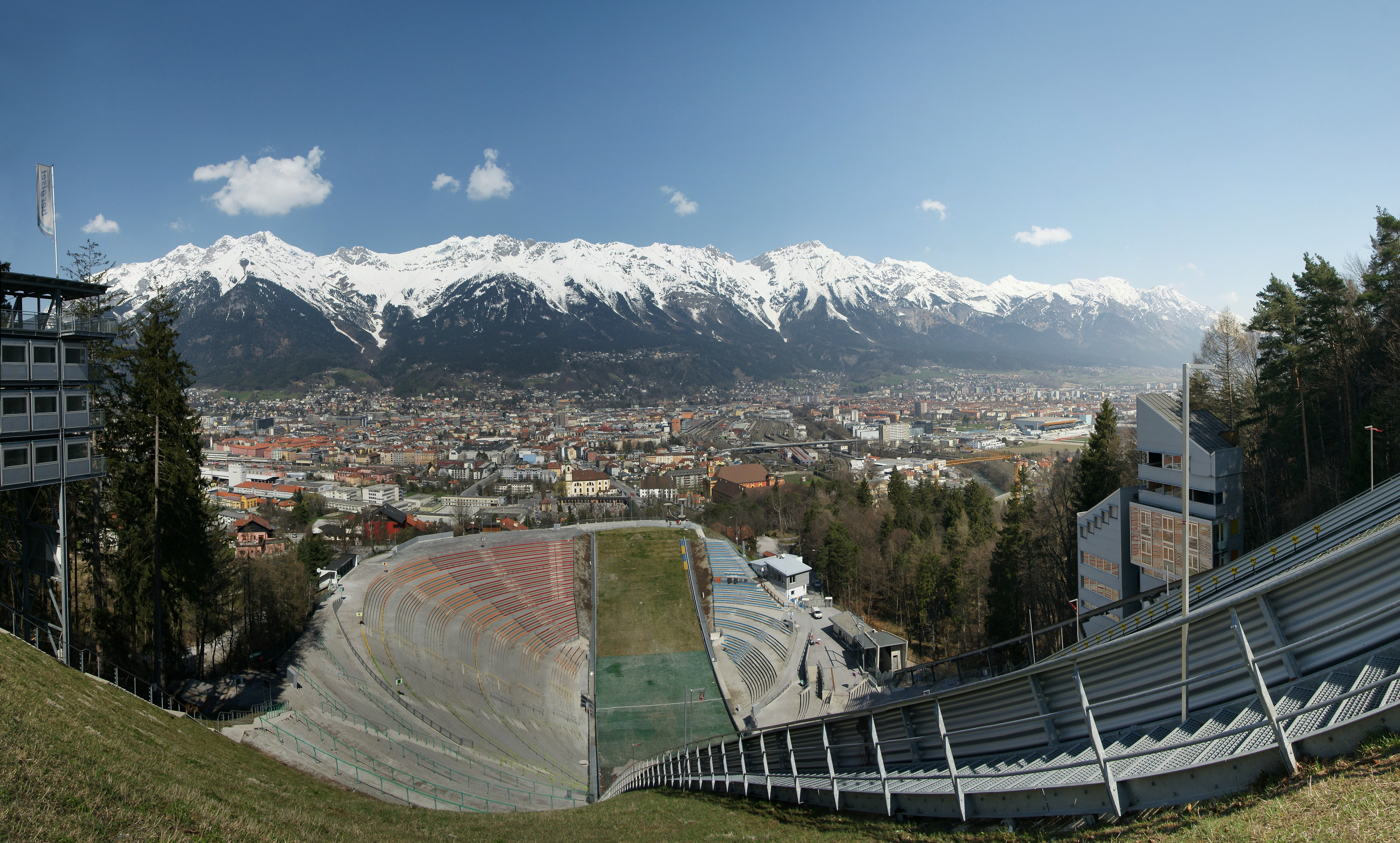 Panorama aus mehreren Bilder von der Bergiselschanze auf Innsbruck mit der noch schneebedeckten Nordkette. NOTE: This image is a panorama consisting of multiple frames that were merged or stitched in software. As a result, this image necessarily underwent some form of digital manipulation. These manipulations may include blending, blurring, cloning, and colour and perspective adjustments. As a result of these adjustments, the image content may be slightly different from reality at the points where multiple images were combined. This manipulation is often required due to lens, perspective, and parallax distortions.